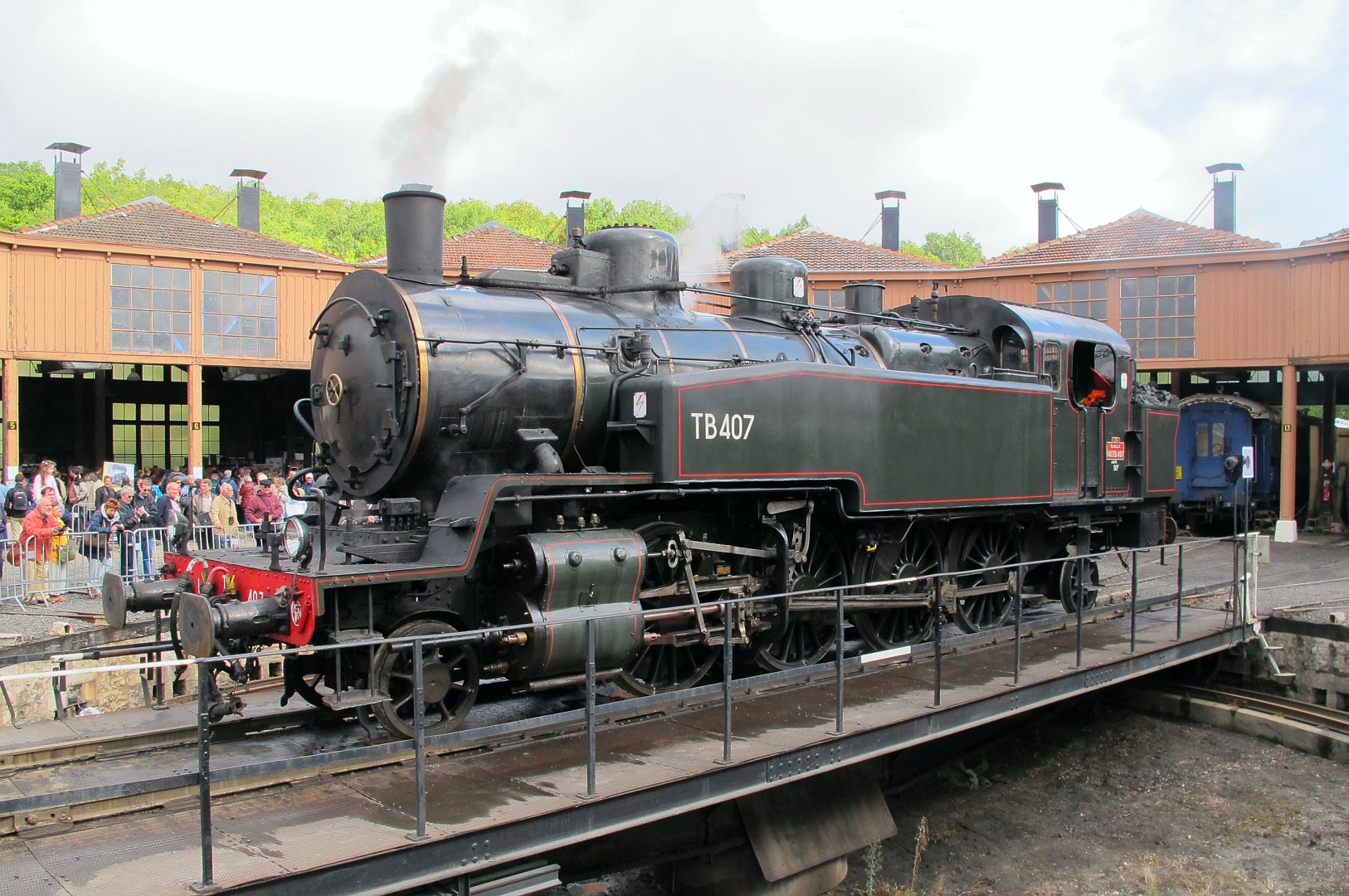 La 141 TB 407 au dépôt de Longueville le 18 septembre 2011.